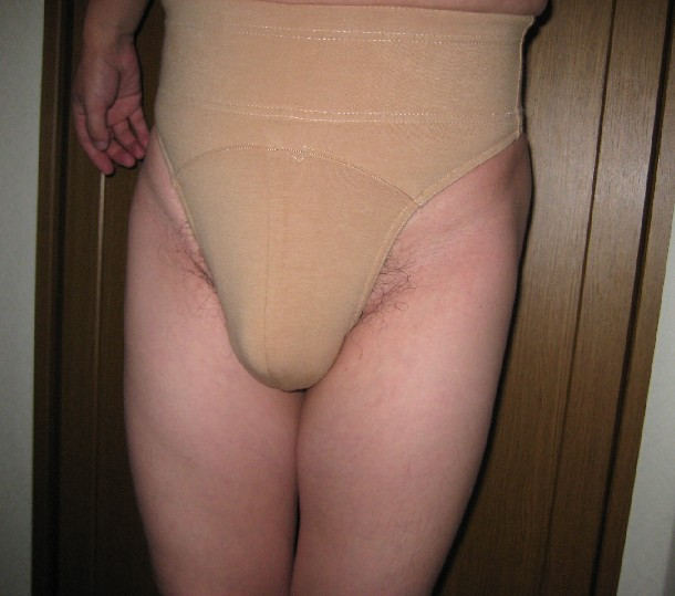 Dance_belt(ダンスベルト、男性用Tバックバレエショーツ）